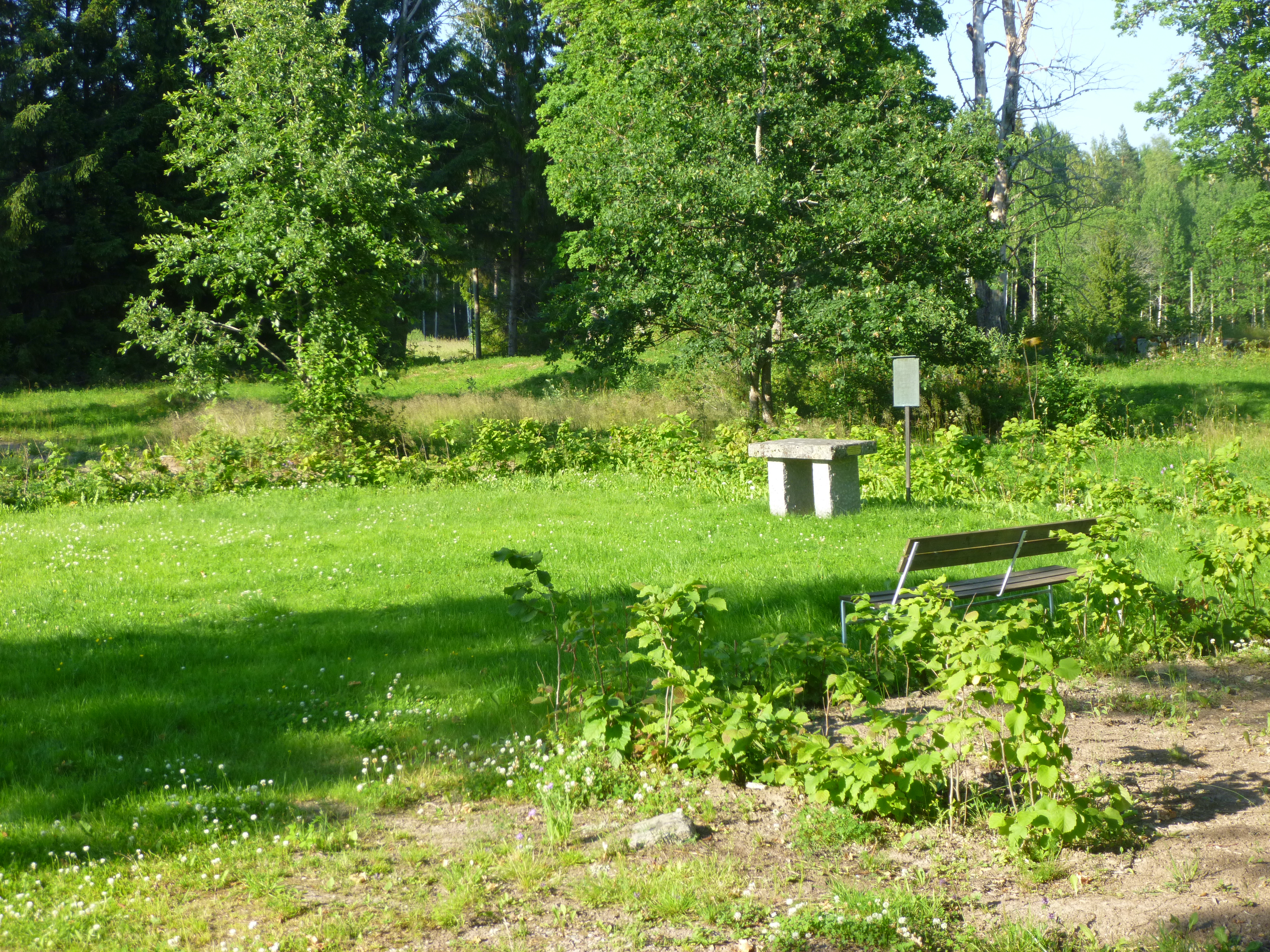 Altarplatsen i Karbennings gamla kyrka